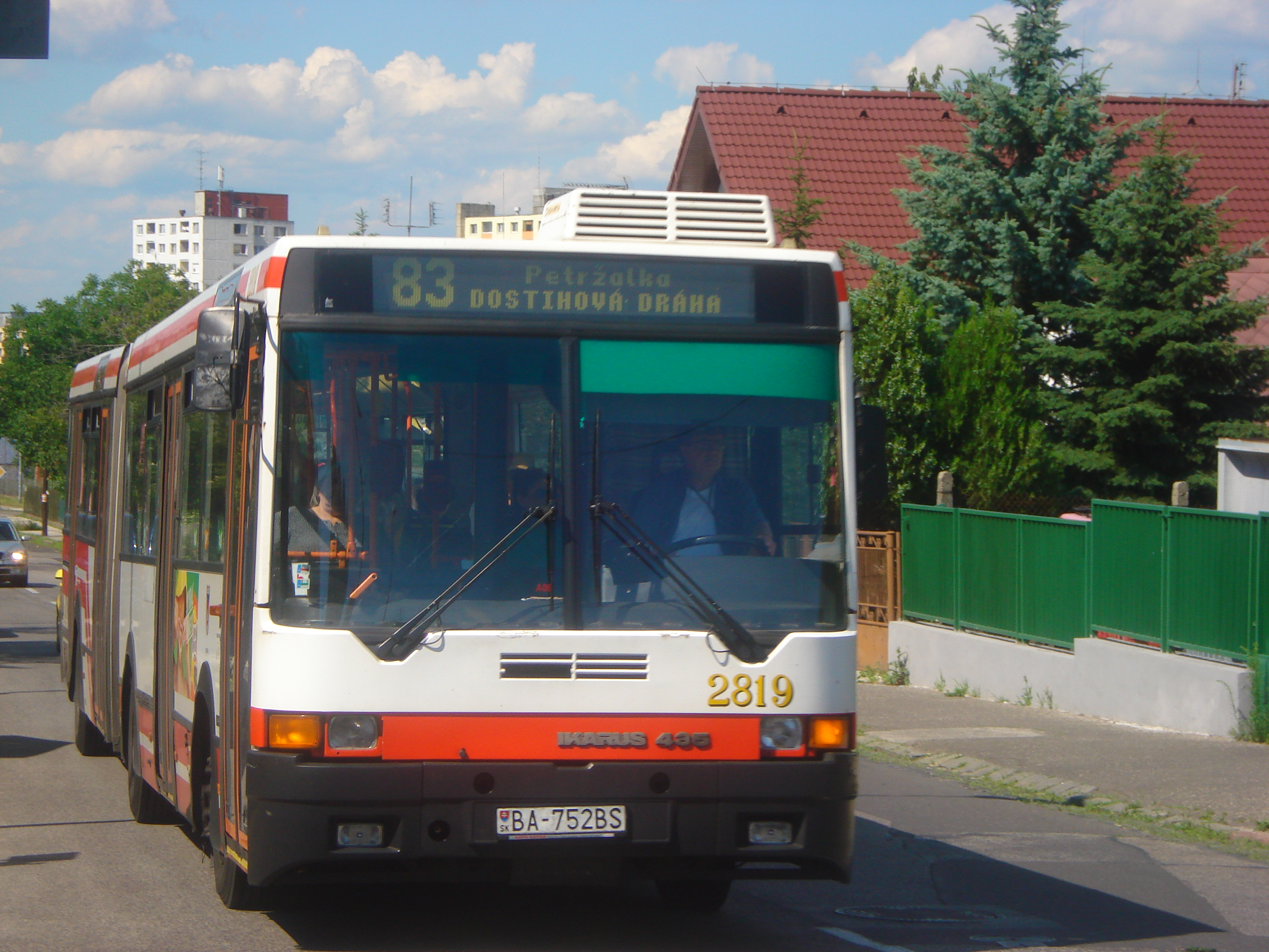 Ikarus 435 v Starej Dubravke